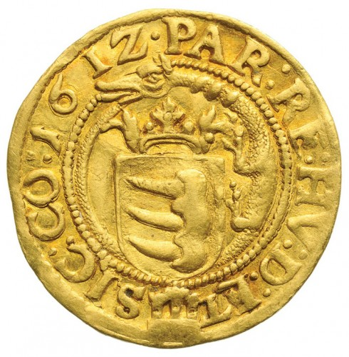 Somlyói Báthory Gábor (Nagyvárad, 1589. augusztus 15. – Nagyvárad, 1613. október 27.) erdélyi fejedelem aranyforintja 1612